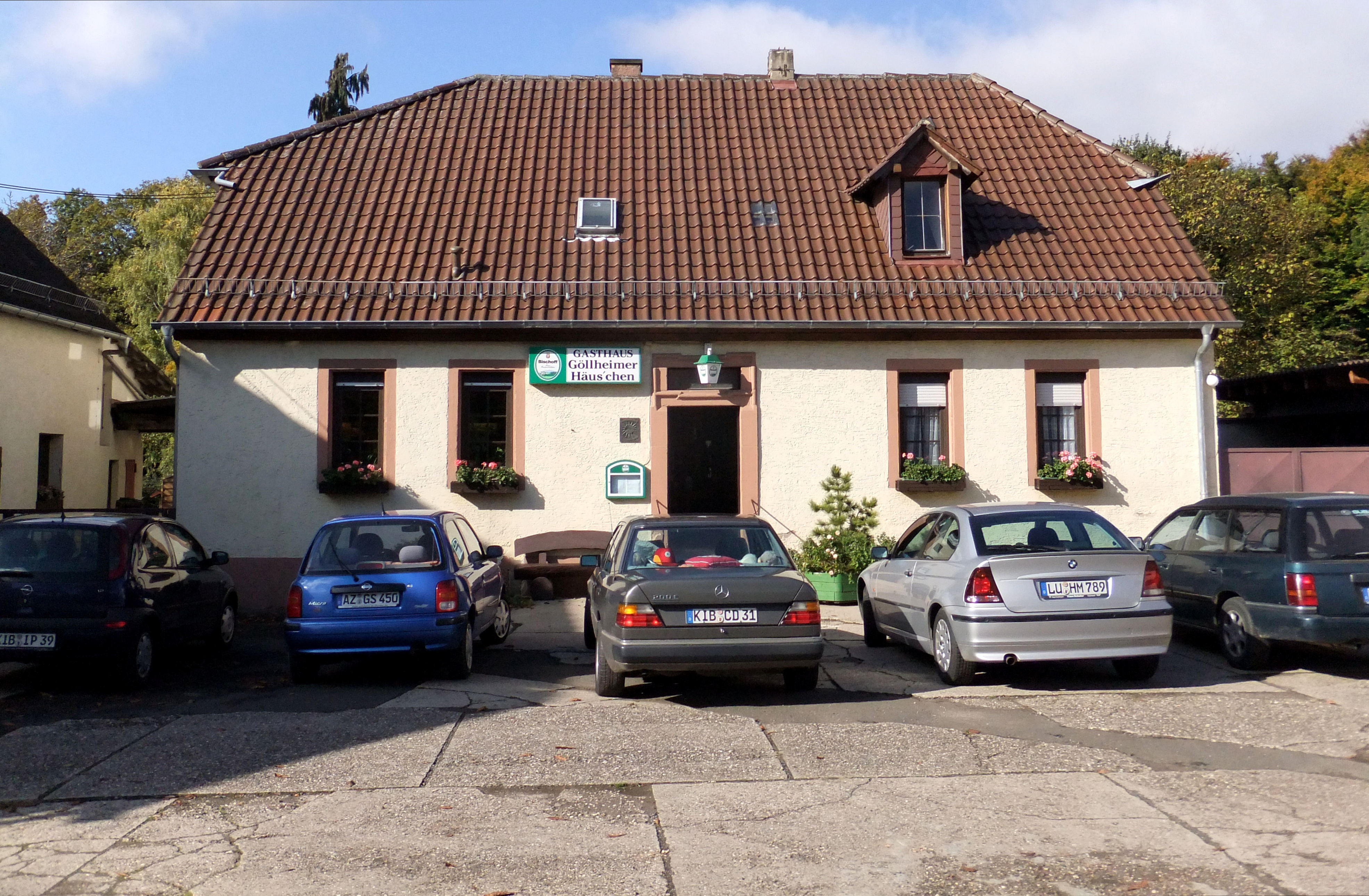 Das Göllheimer Häuschen auf dem Gebiet von Kerzenheim in Rheinland-Pfalz